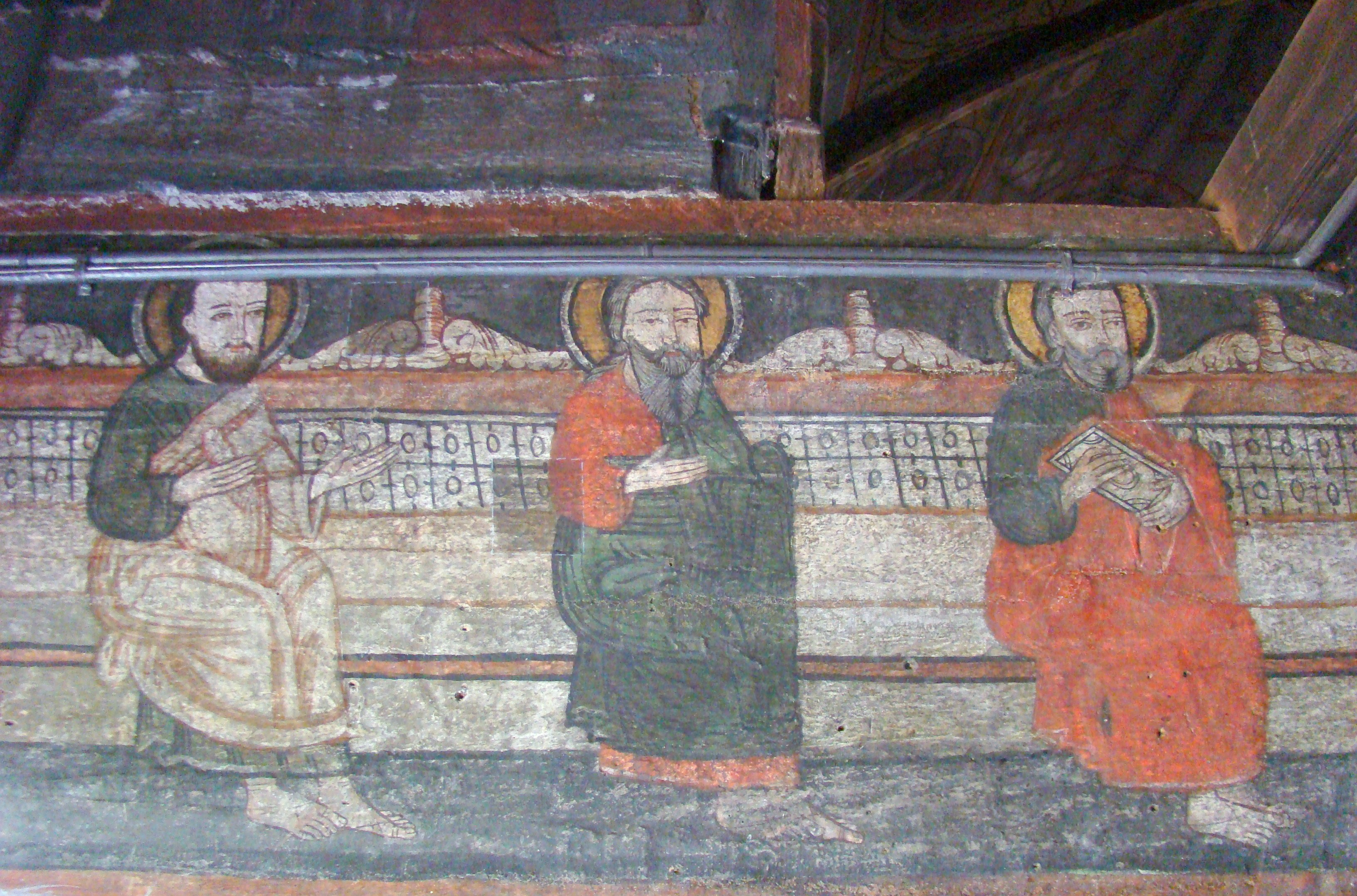 Biserica de lemn din Apoldu de Jos, județul Sibiu